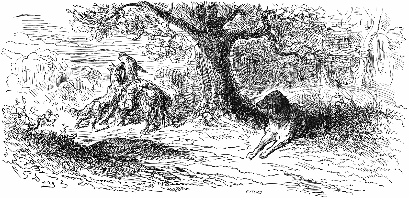 grafika z książki PL Bajki, Jean de La Fontaine, nakładem i drukiem Jana Noskowskiego, Warszawa 1876